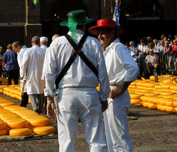 Alkmar cheese market, Netherlands